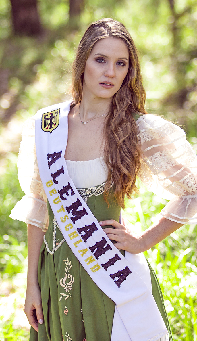 Erika Bohn, Reina Nacional del Inmigrante 2016